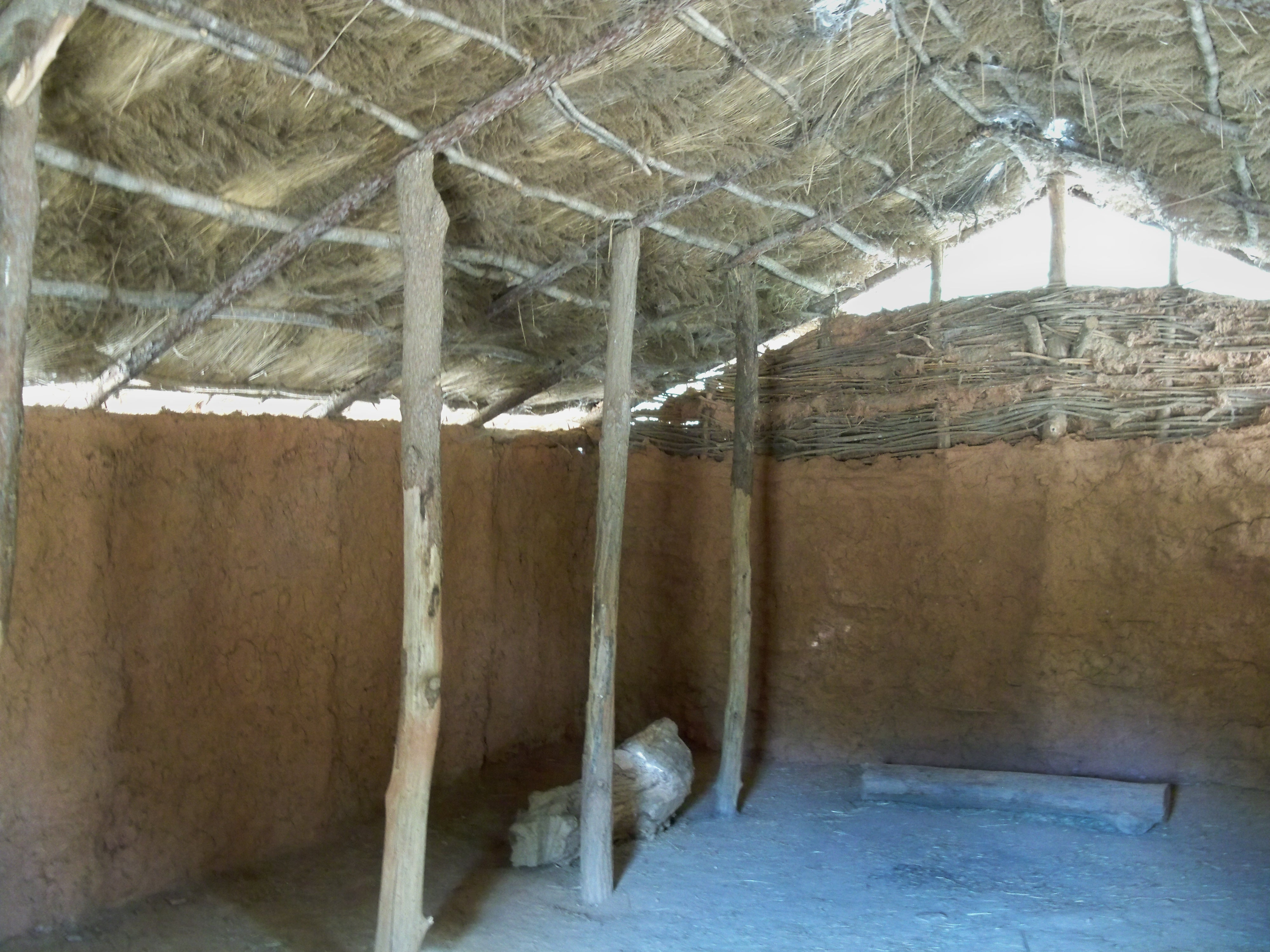 Habitation néolithique à Quinson (04)